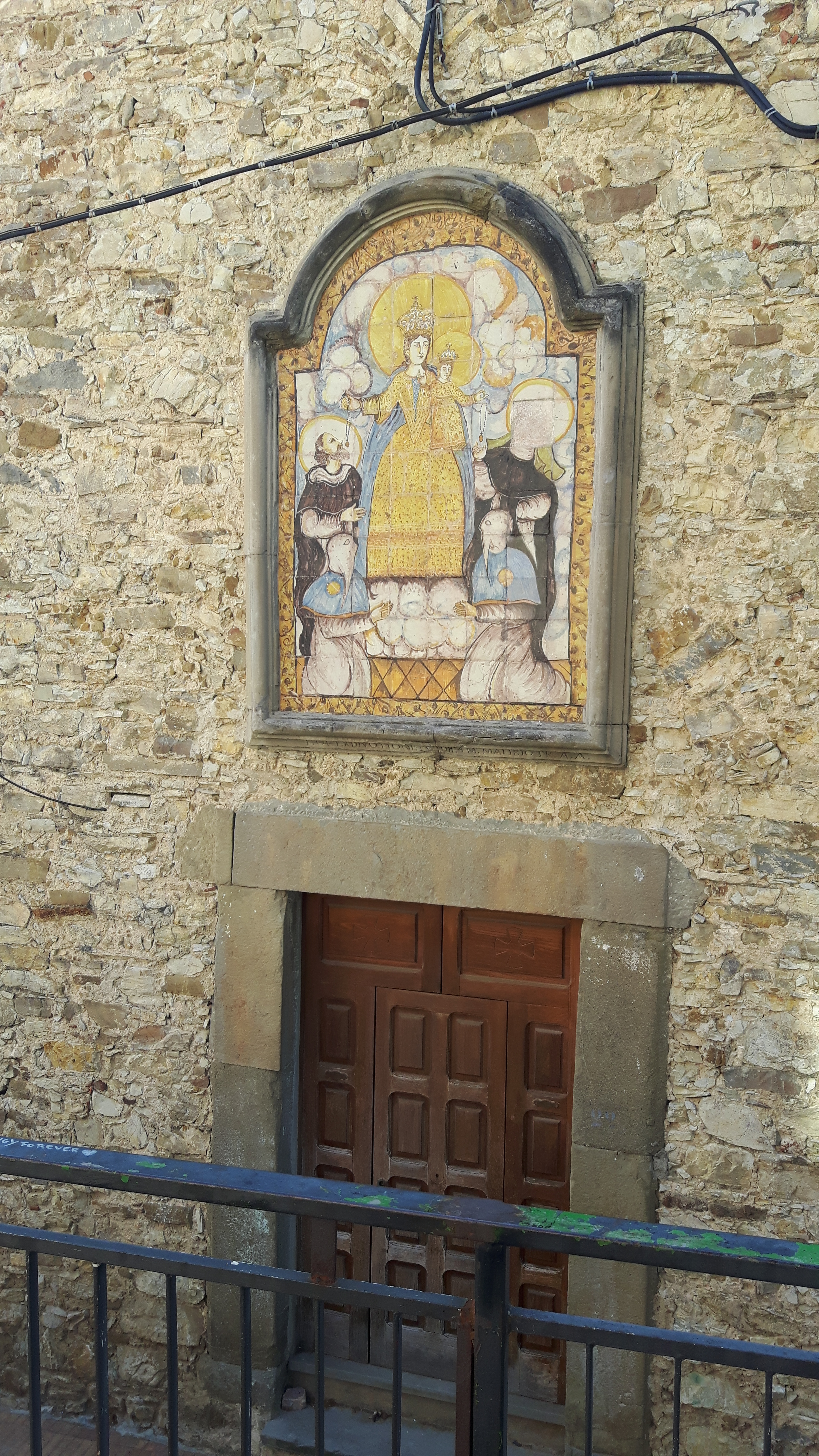 Albanella - Cappella della Congrega del SS Rosario